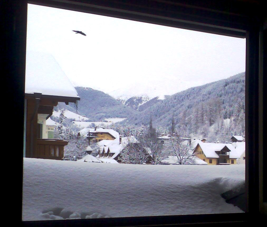 Vista del centro di Dobbiaco by GF Sapri